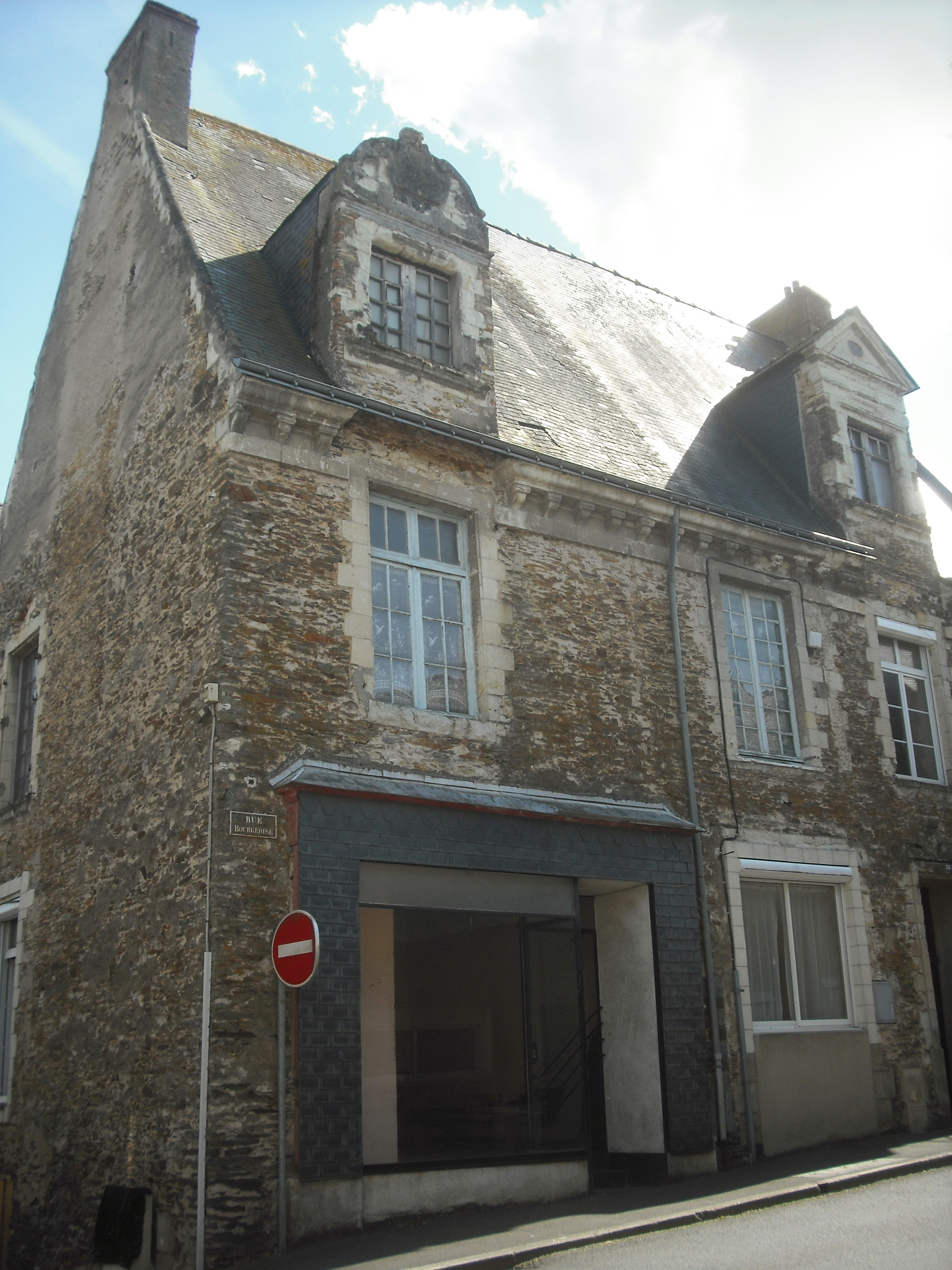 Maison de la Renaissance, Candé, Maine-et-Loire, France.